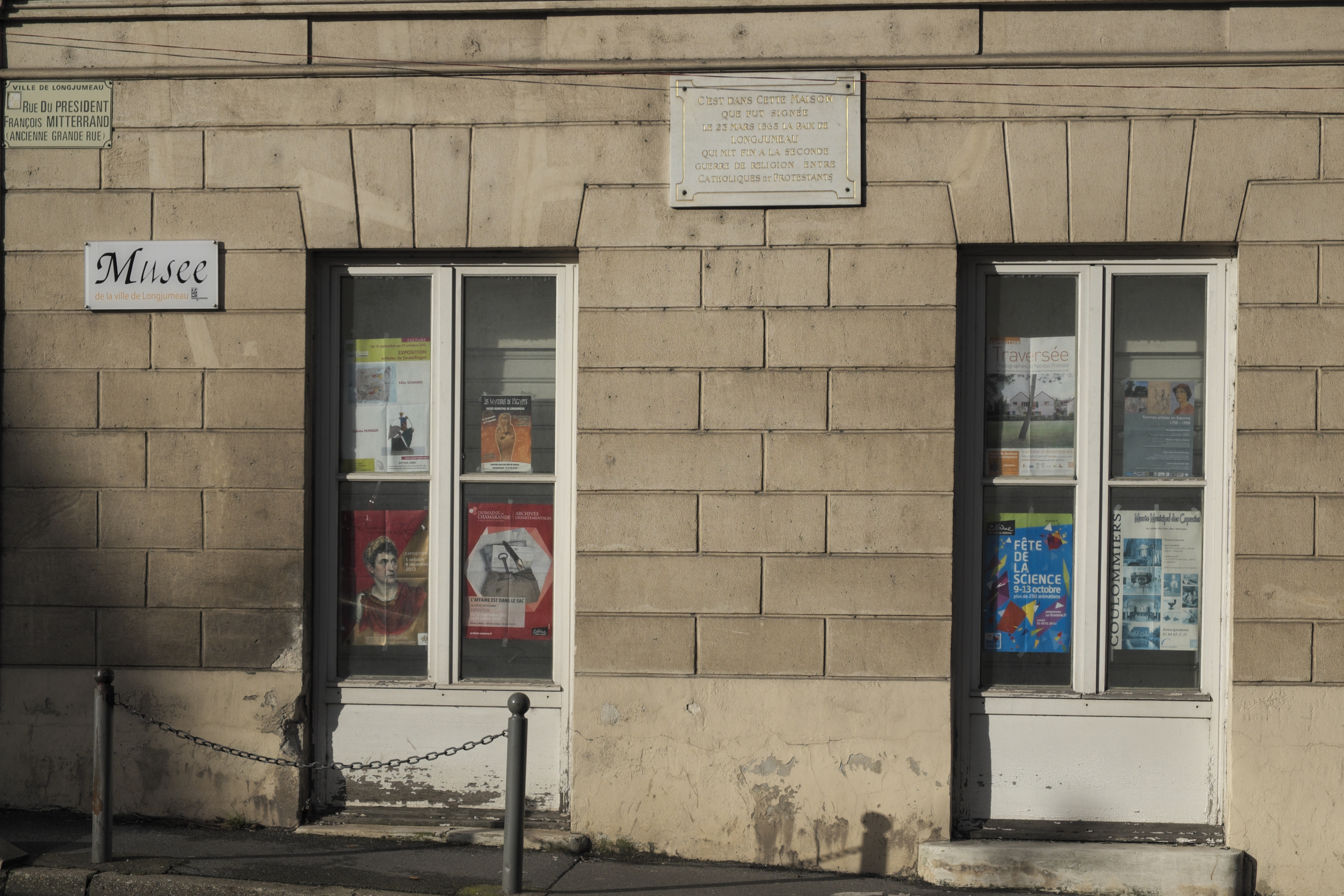 Gedenktafel zu Erinnerung an den Frieden von Longjumeau (Paix de Longjumeau) im Jahr 1568 in Longjumeau im Département Essonne (Île-de-France/Frankreich)